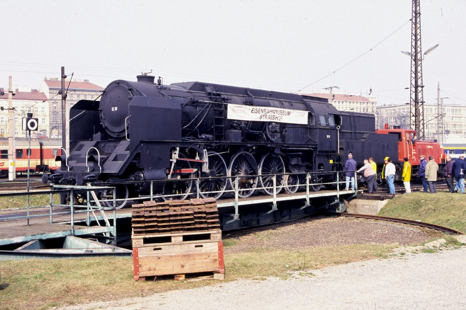 Nach Jahren auf dem Denkmalsockel kehrt die ehemalige 12.10 der ÖBB am Wiener Westbahnhof wieder auf das Gleisnetz zurück, hier bei Vorbereitungen zum Abtransport ins Eisenbahnmuseum Strasshof.